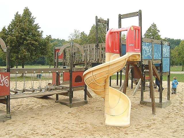 Spielplatz mit Rutschbahn und Klettergeräten im Niddapark, ehemaliges BUGA-Gelände in Frankfurt am Main.